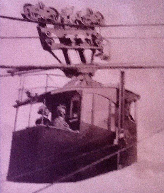 Funivia San Vigilio - Cartolina storica